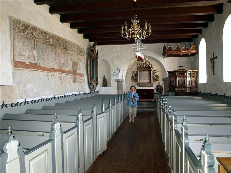 Ferring Kirke i Danmark. Skibet set mod øst